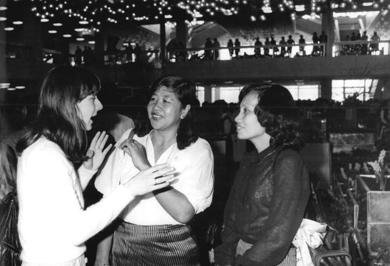 ADN-ZB Grimm 6.3.87 Berlin: XII. DFD-Kongreß Im Gespräch vor Beginn des zweiten Beratungstages im Palast der Republik v.l.: Heike Löschmann, Nuth Kim Lay, stellvertretende Vorsitzende der Vereinigung der Revolutionären Frauen Kampucheas, und Res Sivanna, stellvertretende Leiterin der Abteilung internationale Verbindungen der Vereinigung der Revolutionären Frauen Kampucheas.